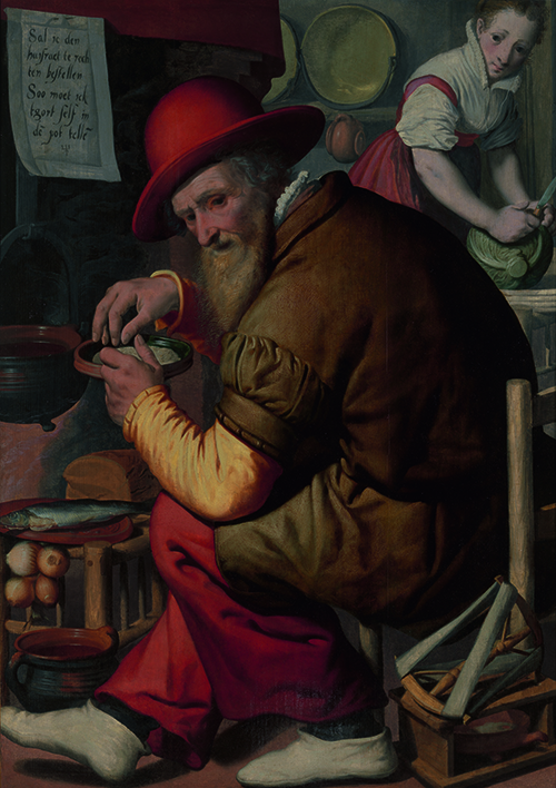 Pieter Pieterzs, De gortenteller, 1560-1600, olieverf op paneel, 134 x 101,3 x 7 cm.